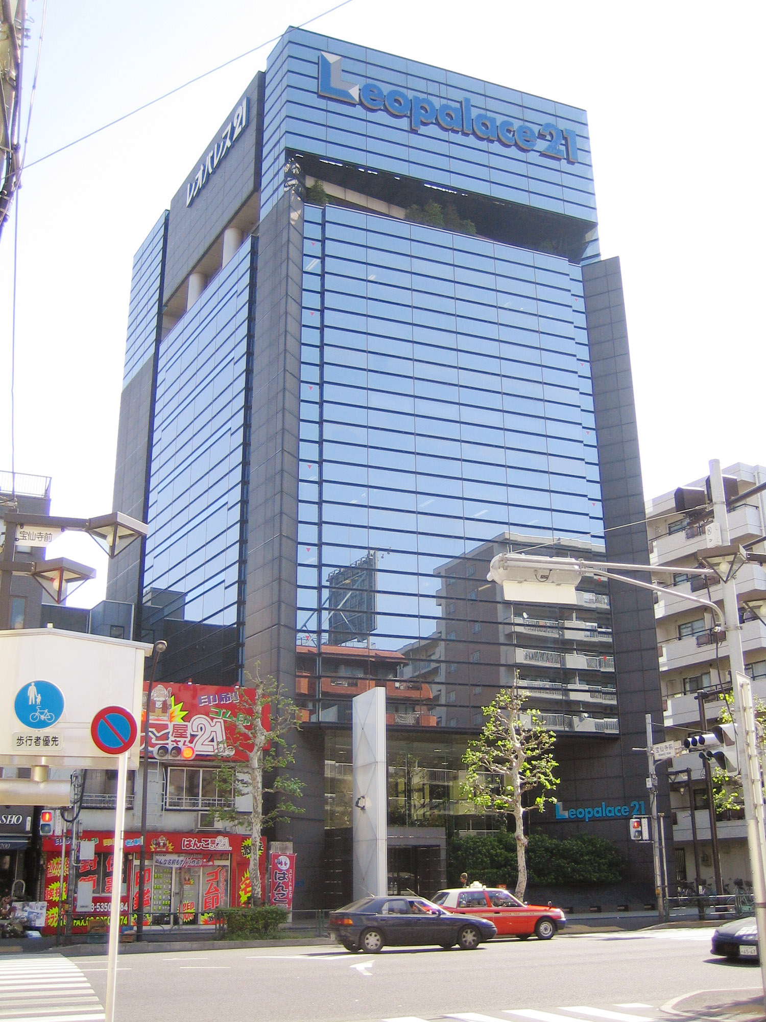 Leopalace21 (レオパレス21), in Nakano, Tokyo, Japan